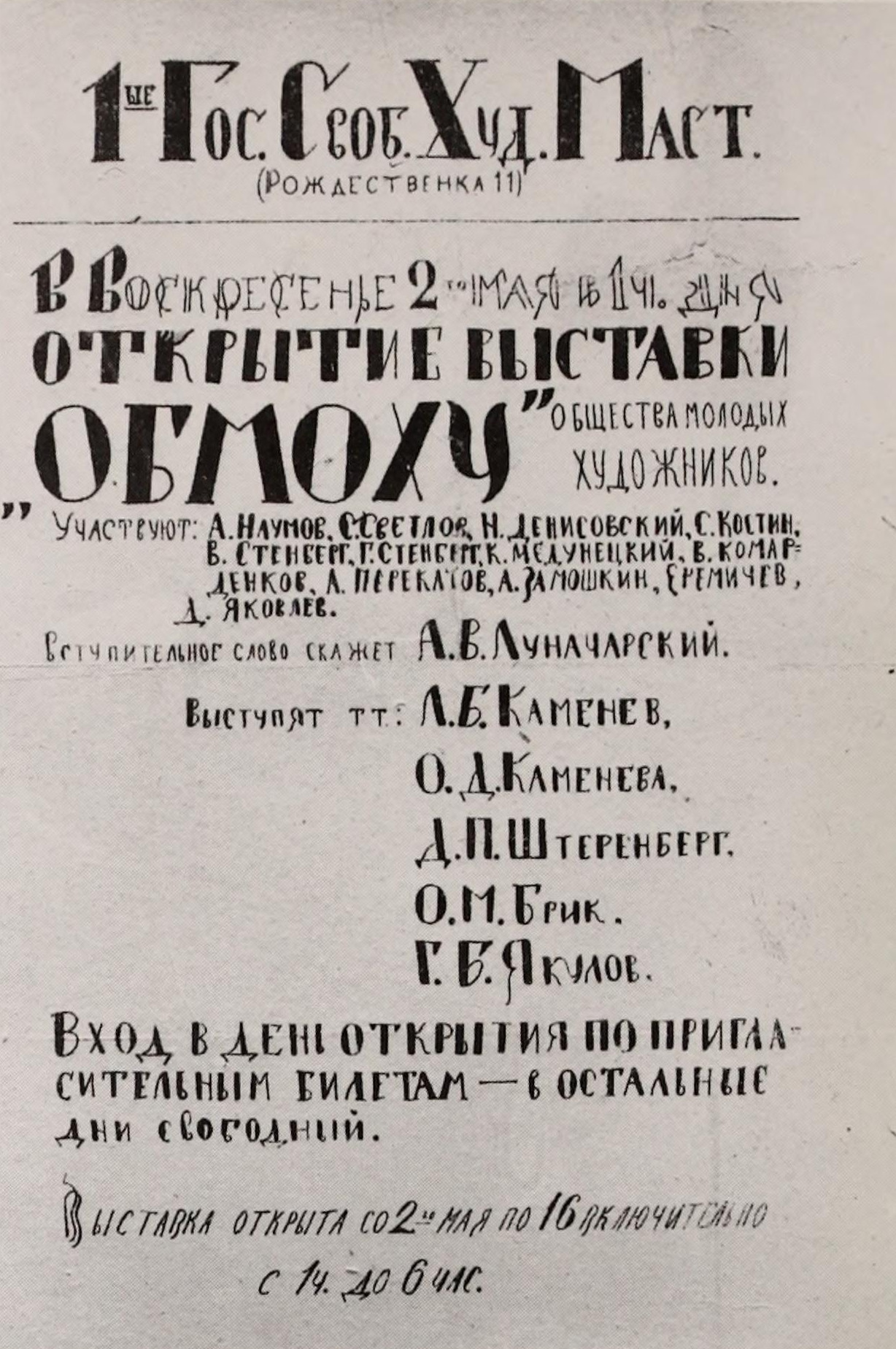 Poster for the First Exhibition of OBMOKhU, May 1920